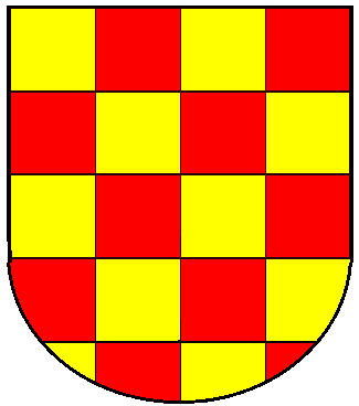 Escut de l'antic municipi d'Eroles - Fígols de Tremp (Tremp, Pallars Jussà)